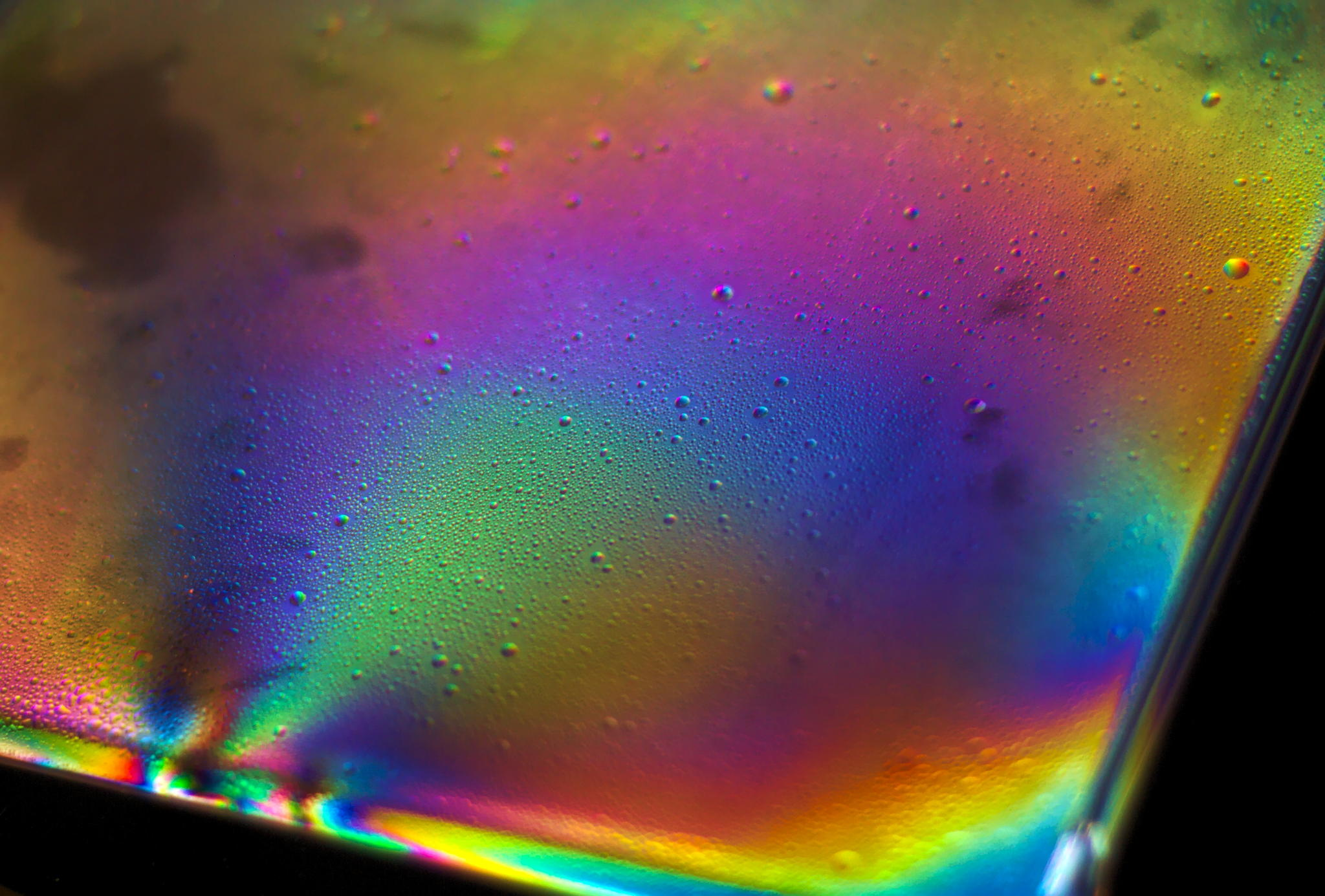 Фрагмент изделия из поликарбоната